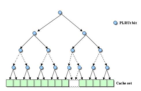 Arbre de décision binaire PLRUt